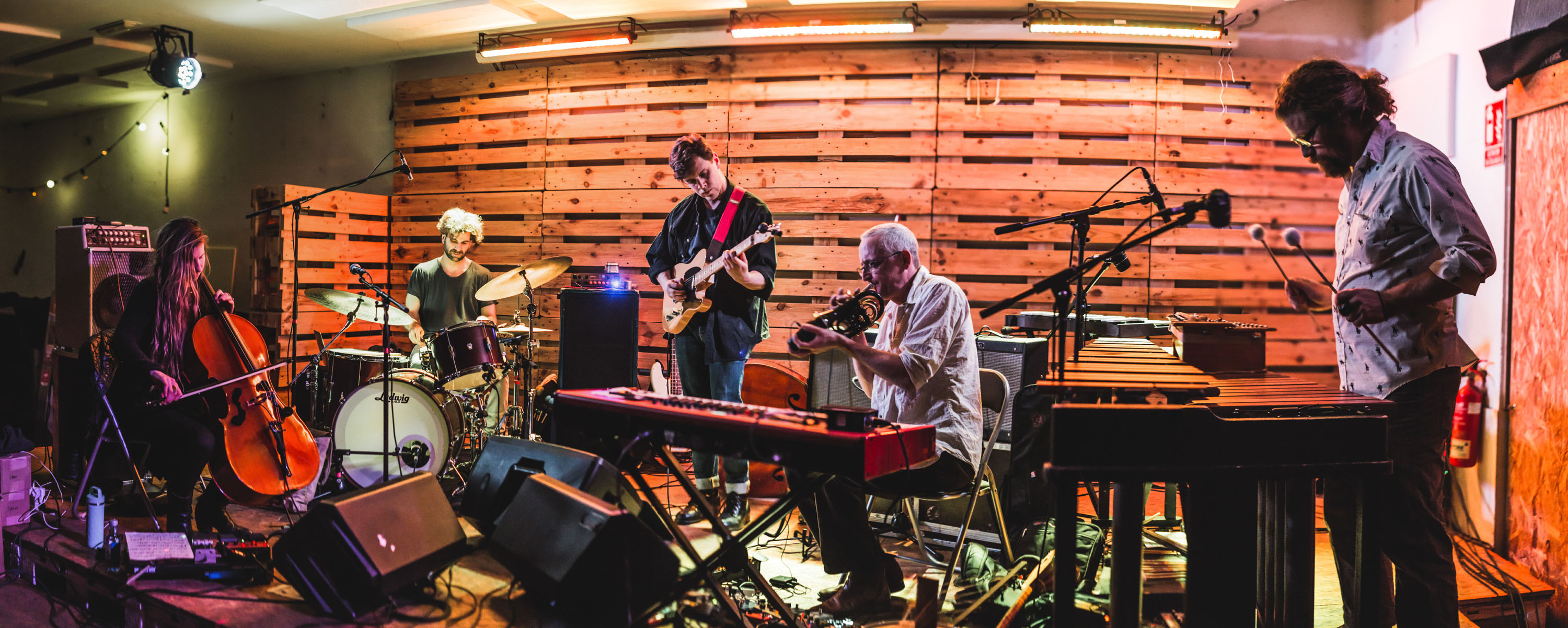 Esmerineren kontzertua Donostiako Dabadaban, 2018ko martxoaren 21ean. 2018/3/21